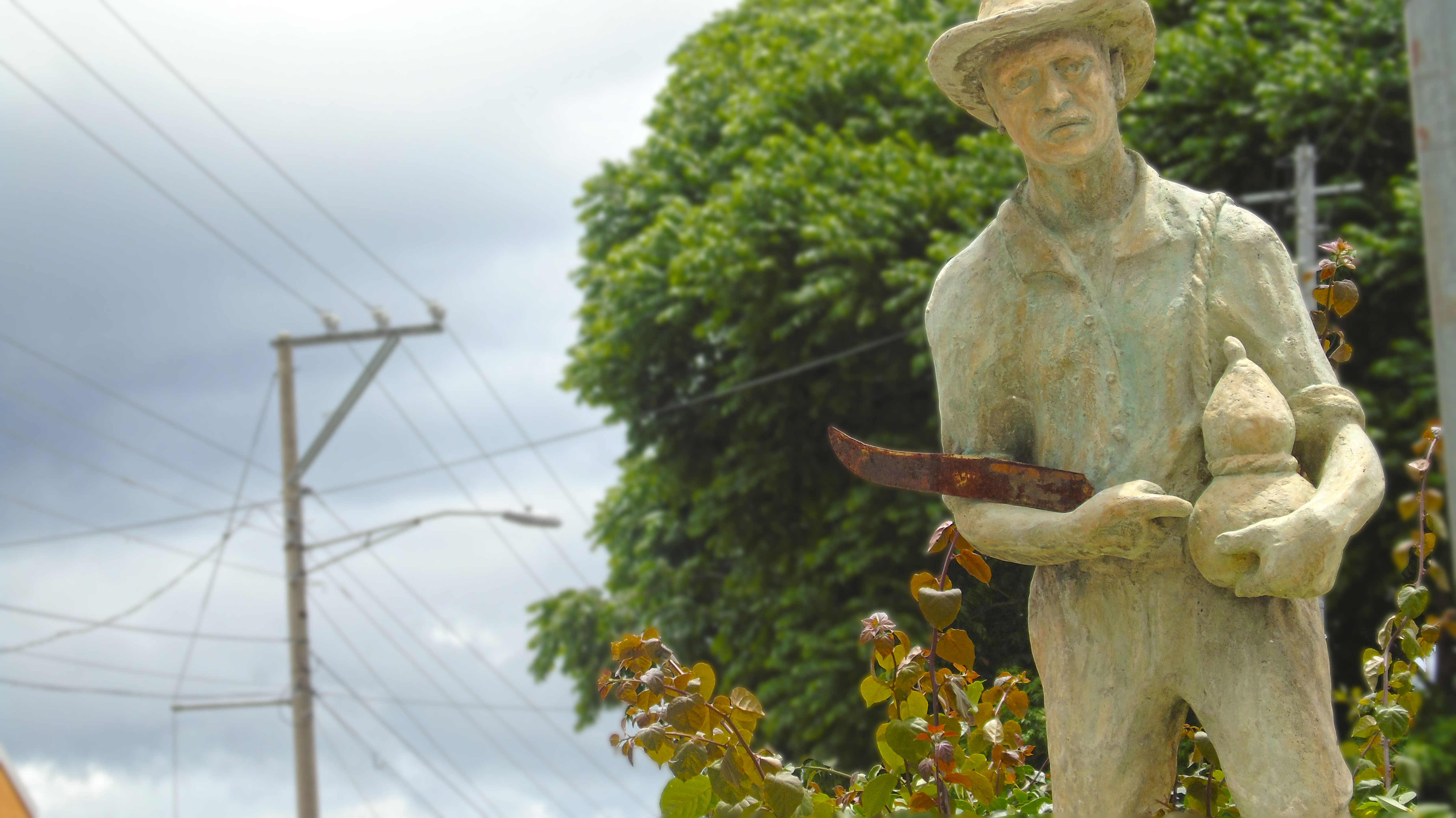 Monumento Jacinto Torrez